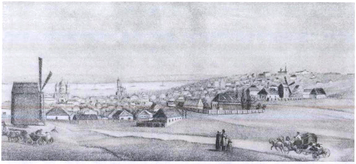 Ekaterinoslav